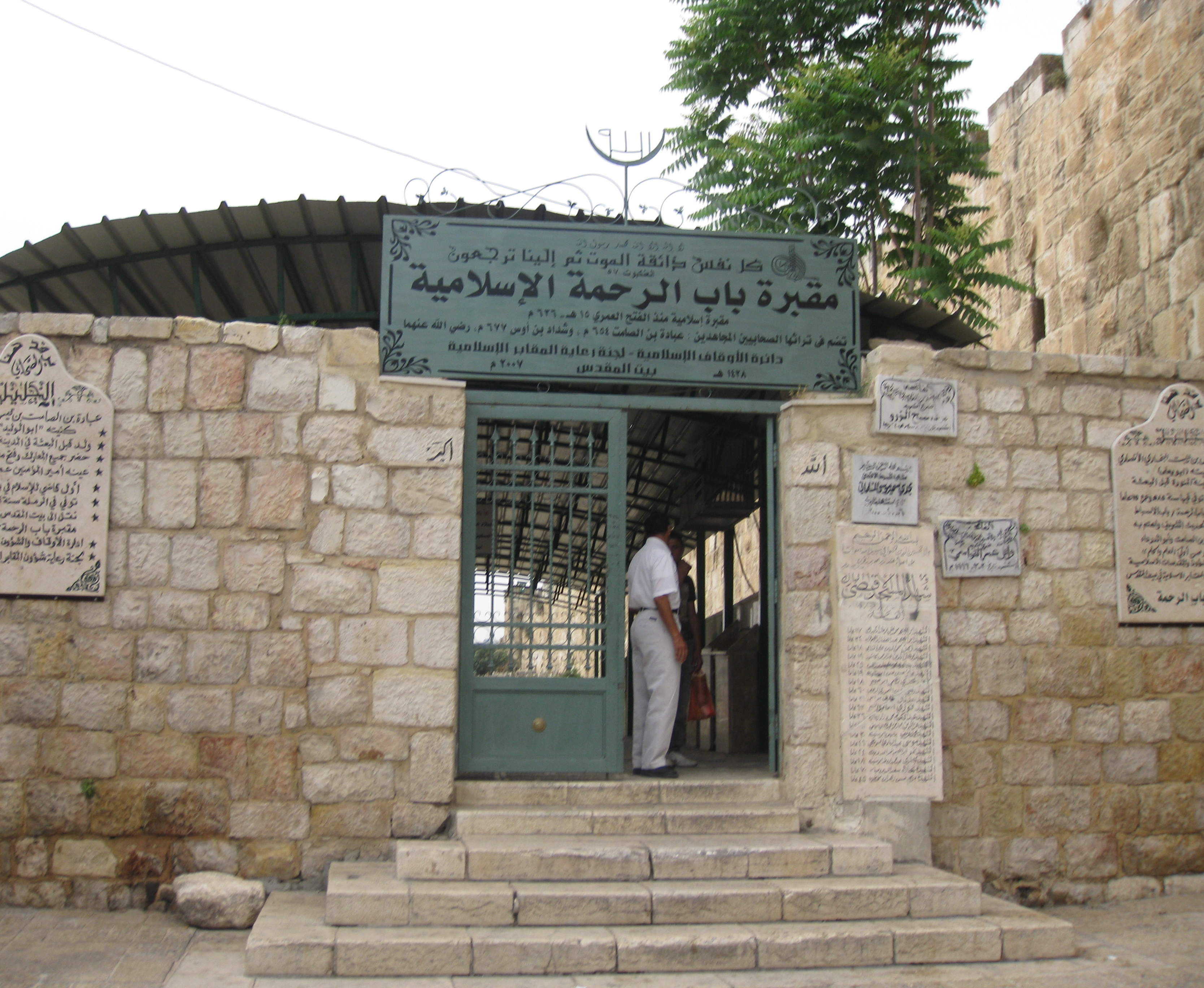 Muslim Quarter הרובע המוסלמי בירושלים בית הקברות הסמוך לשער האריות